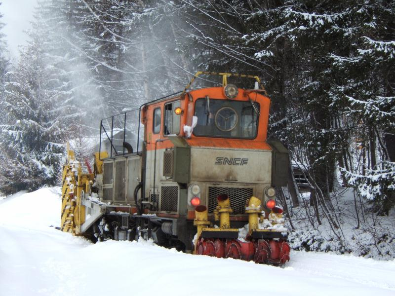 Chasse-neige CN4 de la Ligne Saint-Gervais-les-Bains-Le Fayet - Vallorcine